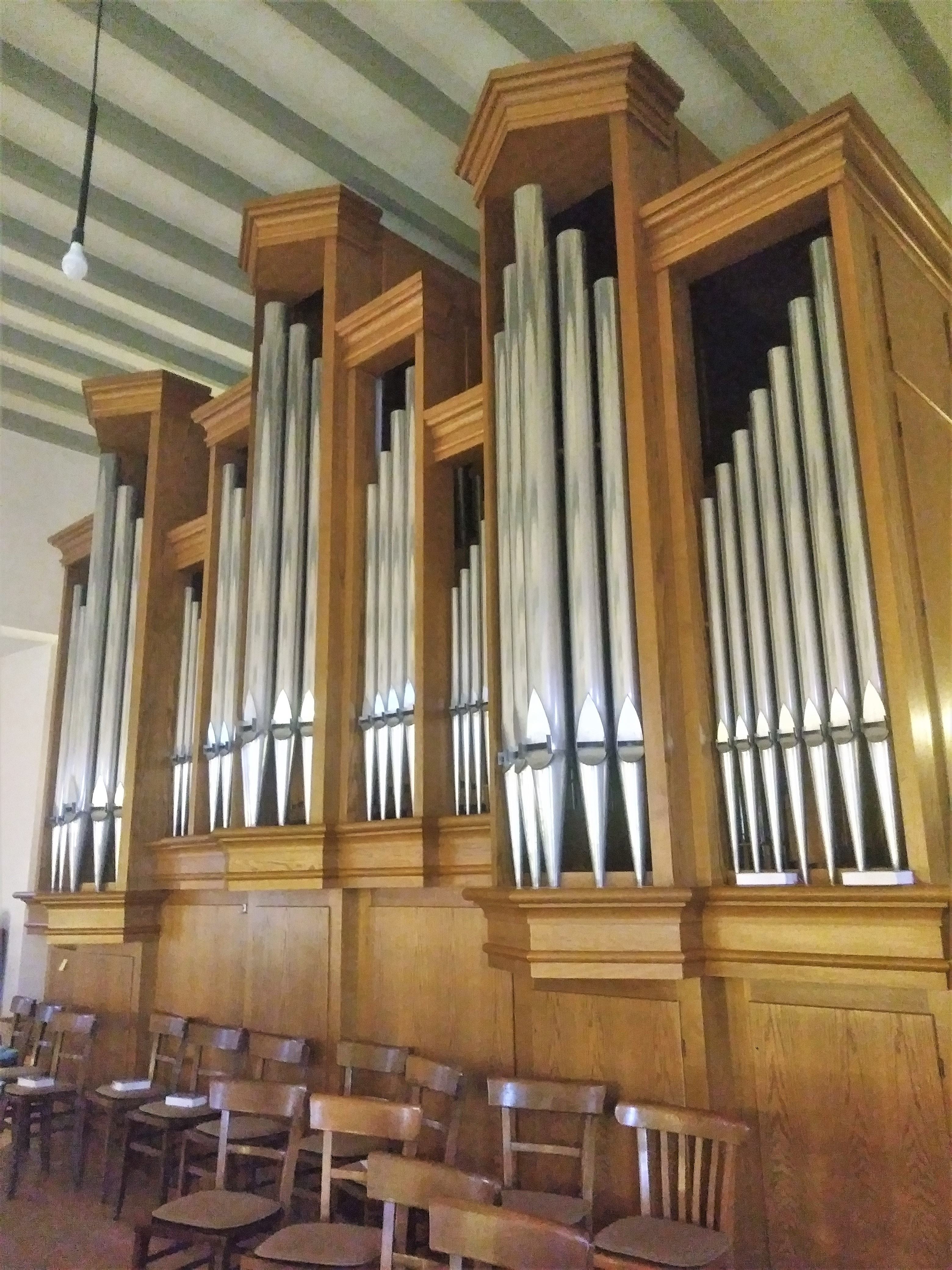 St. Maternus (Aschbach)